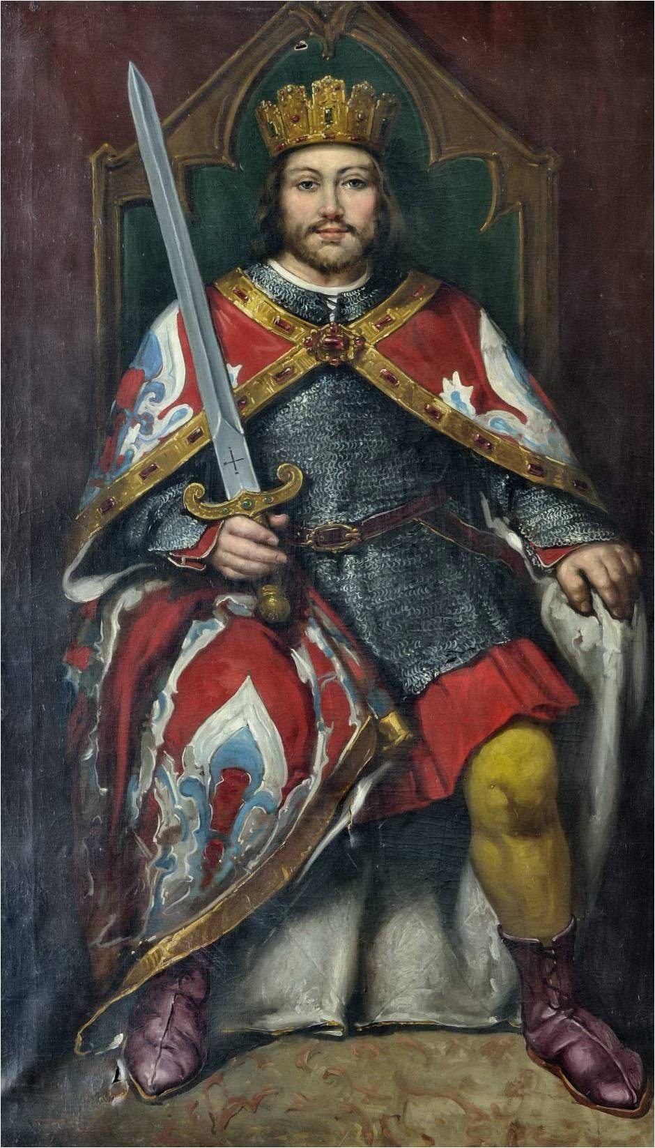 Retrato imaginario del rey Sancho I de León (c.935-966). Fue hijo del rey Ramiro II de León y de la reina Urraca Sánchez. Fue sucedido por su hijo, Ramiro III de León.